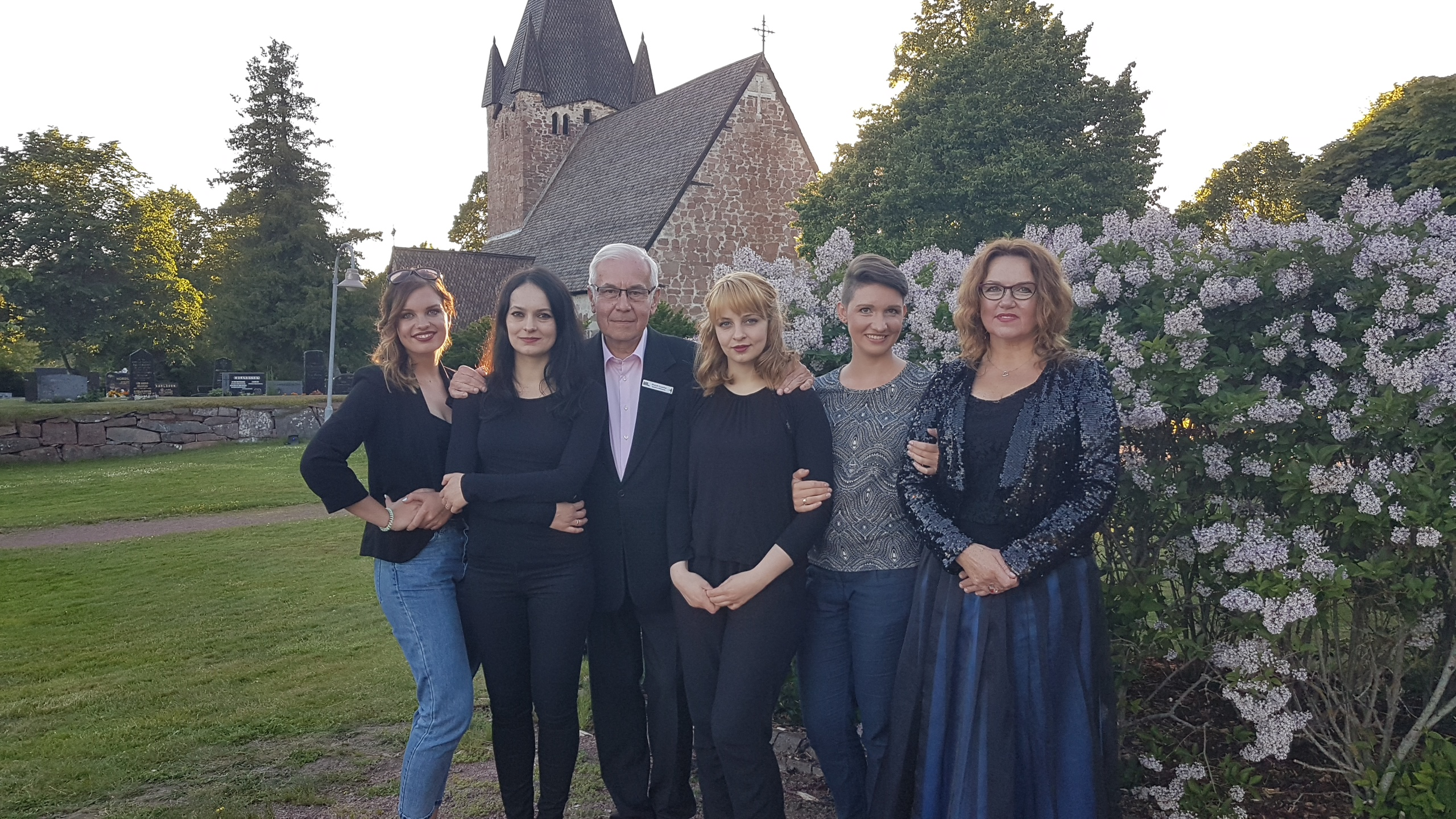 29.6.2017. Artu'S KWARTET med organisten Agnieszka Tarnawska efter konserten i Finströms kyrka